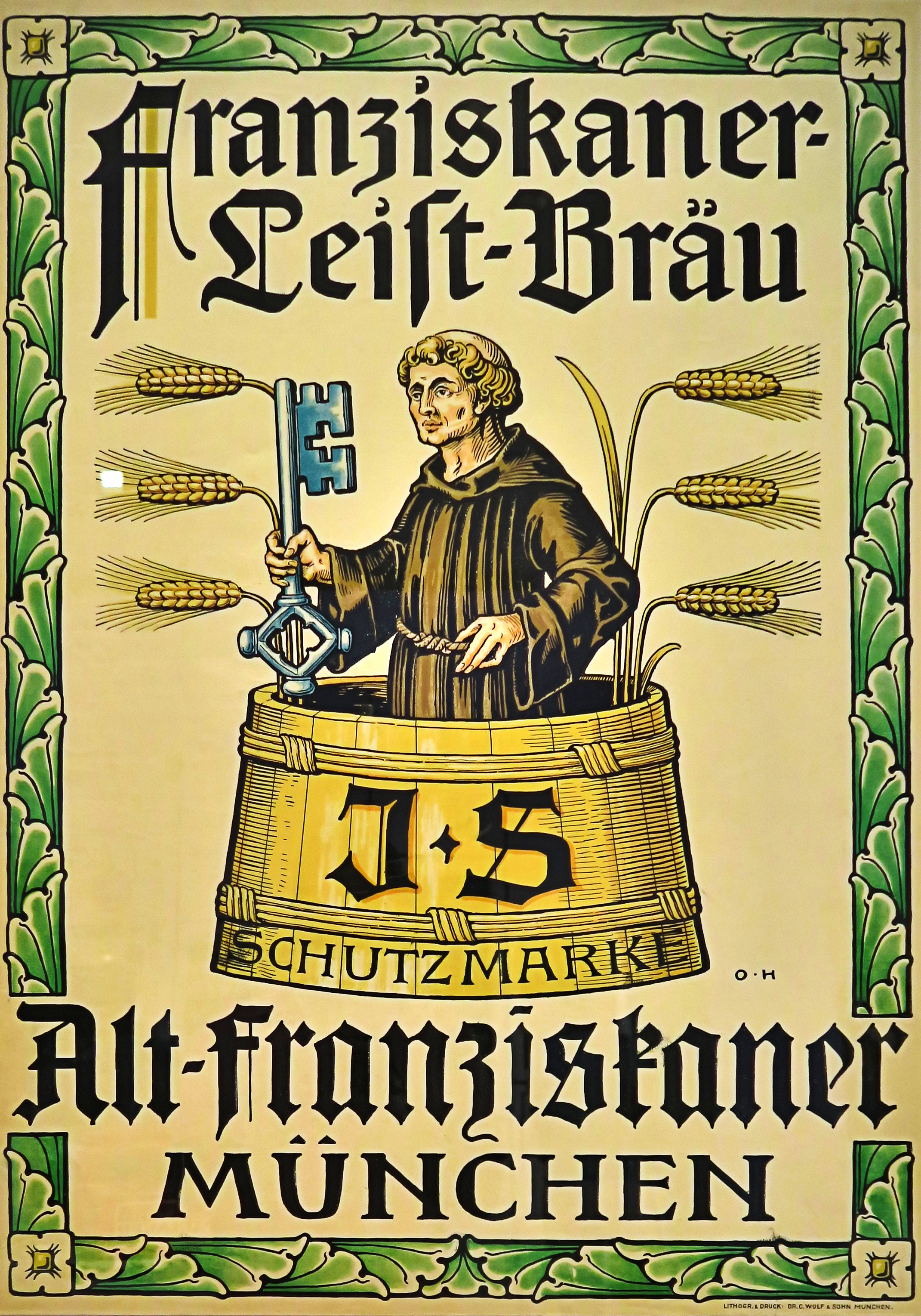 Lithograhie eines Werbeplakatas von Otto Hupp (*1859) des Franziskaner-Leist-Bräu um 1900 (Alt-Franziskaner München)